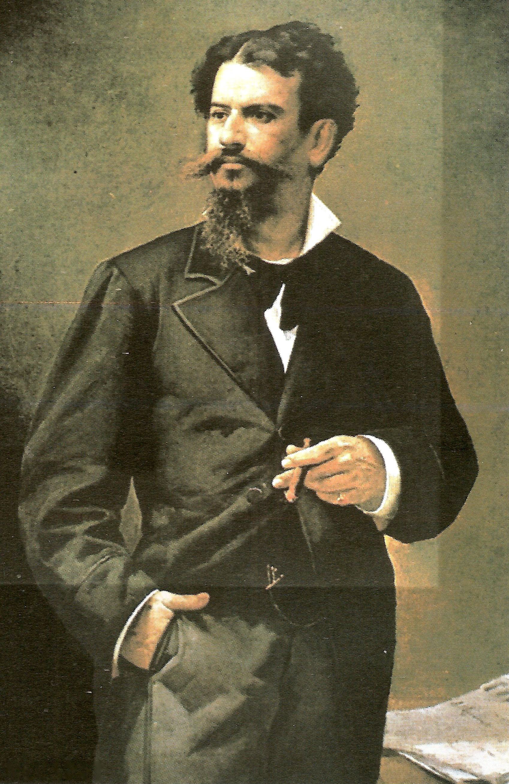 Eduardo Blanco S/F. Óleo/tela. Caracas - Venezuela